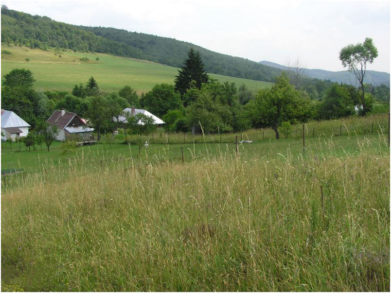 Celkový pohľad